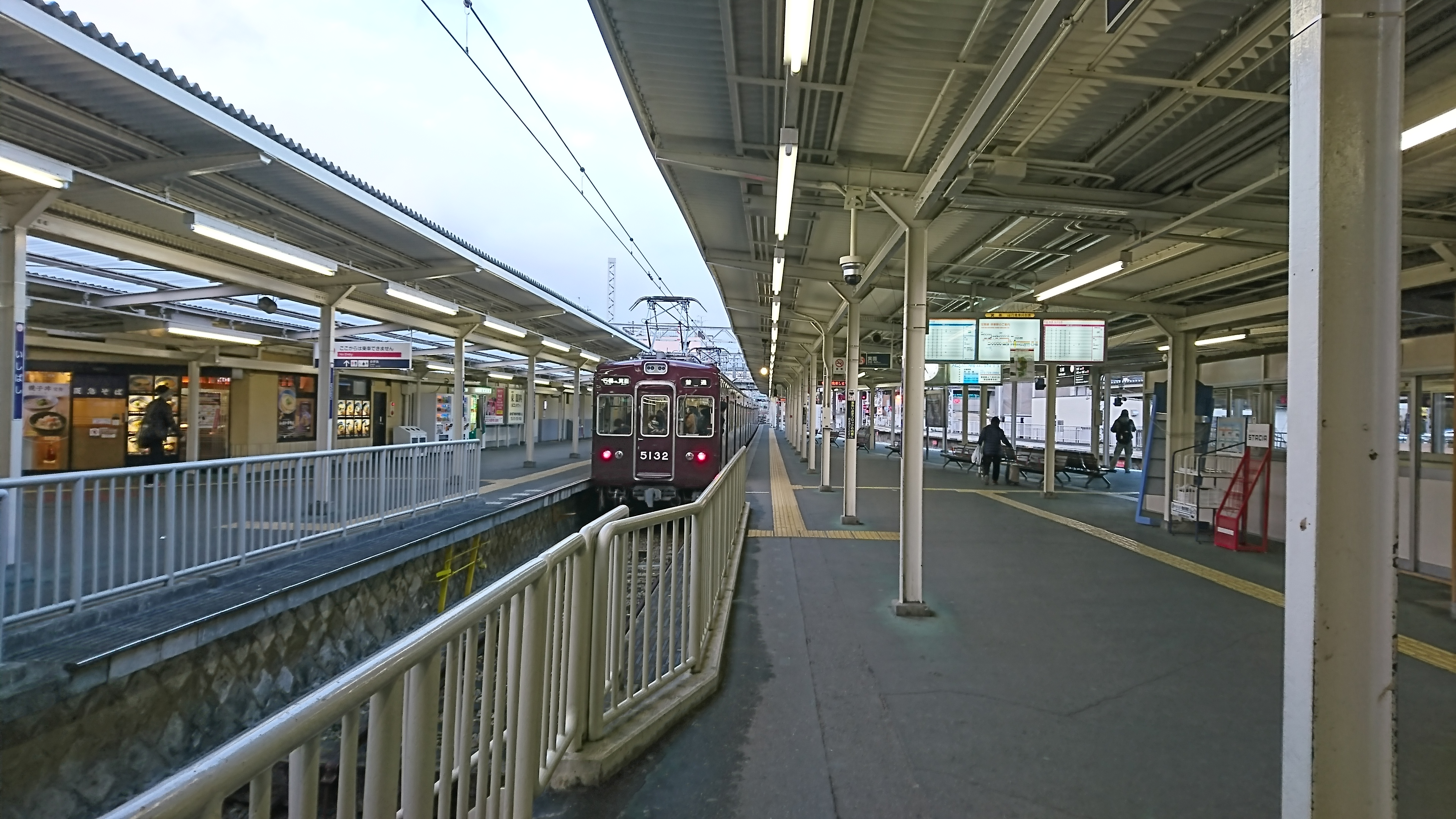 阪急石橋駅5号線